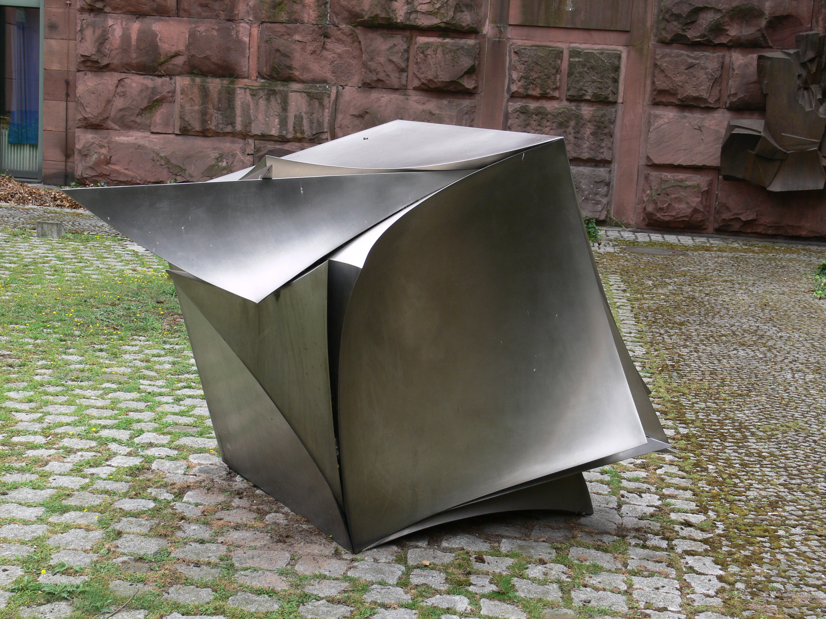 Kunsthalle Mannheim, Skulpturengarten Erich Hauser: 6/77, Edelstahl, 1977